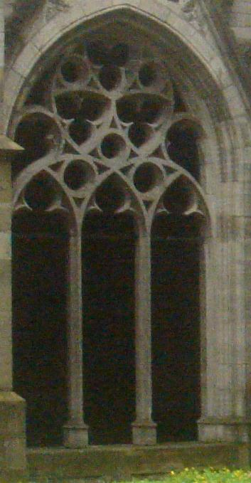 Cropped foto van raam, gedeelte van Pandhof van de Dom van Utrecht